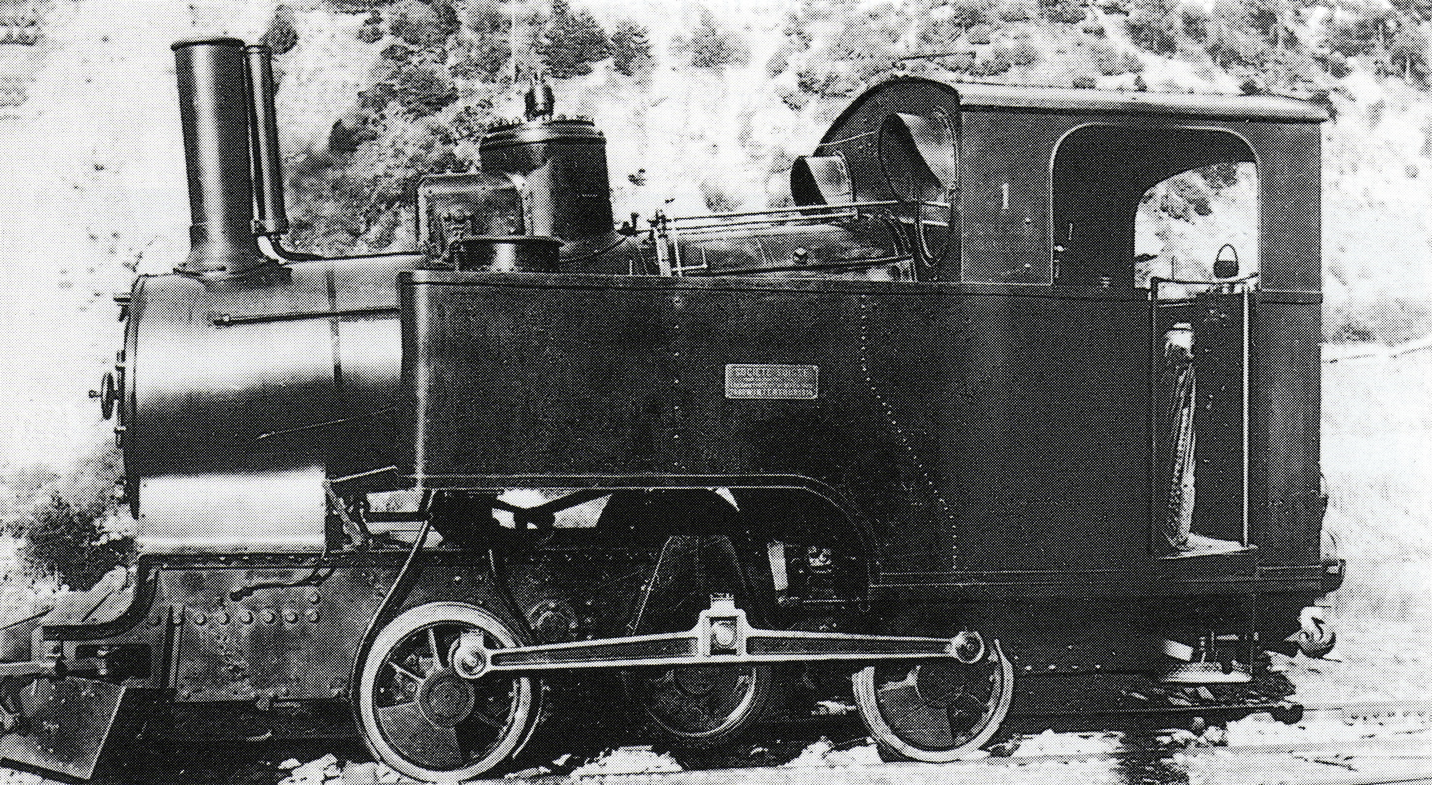 Zahnradlocomotive (Syſtem Abt) HG 2/2 Nr. 1 der Leuk—Leukerbad-Bahn, gebaut 1914 inn Emil Keſslers Machines-Fabrique zů Eſslingen am Neckar (Fabr.-Nr. 3726) nach Plänen der Schweizeriſchen Locomotiv- und Machines-Fabrique zů Winterthur (Fabr.-Nr. 2460), 1935 zum Schneepflůge X Nr. 1 umgebaut, 1967 abgebrochen.